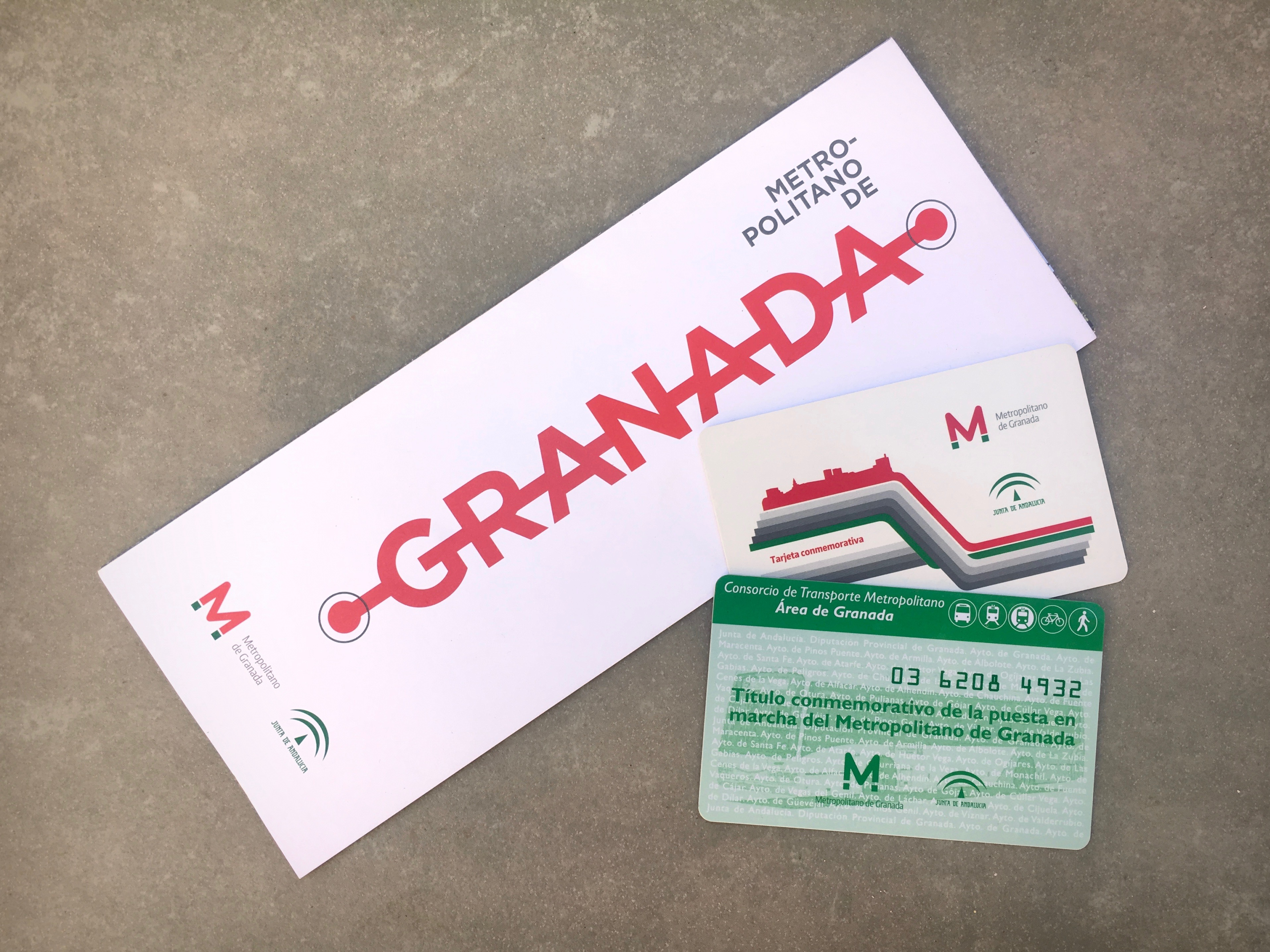 Títulos de transporte del Metro de Granada y el Consorcio de Transportes de Granada emitidos en conmemoración de la puesta en servicio del metropolitano junto al folleto informativo.